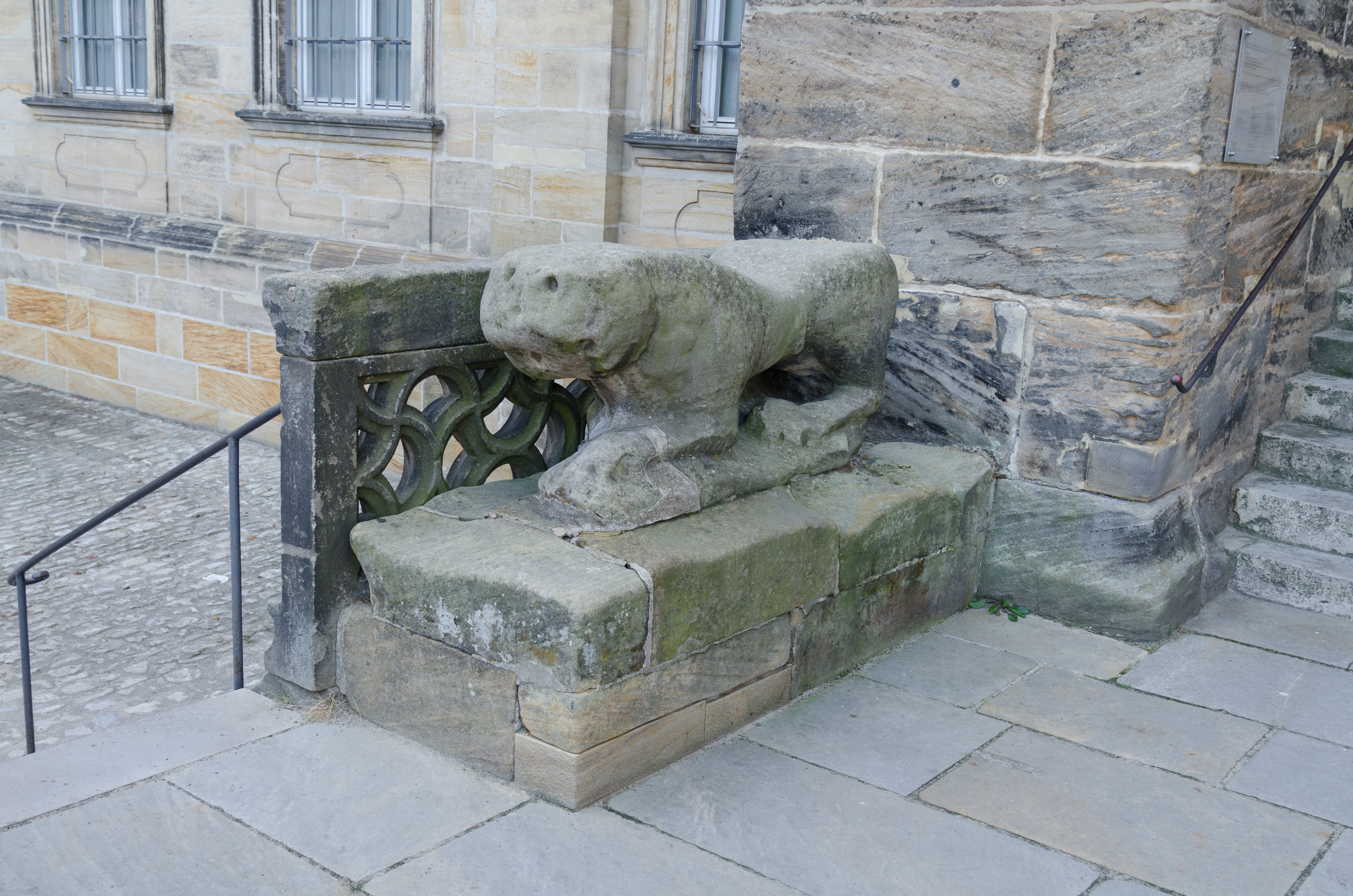 Bamberg, Dom, südliche Domkröte